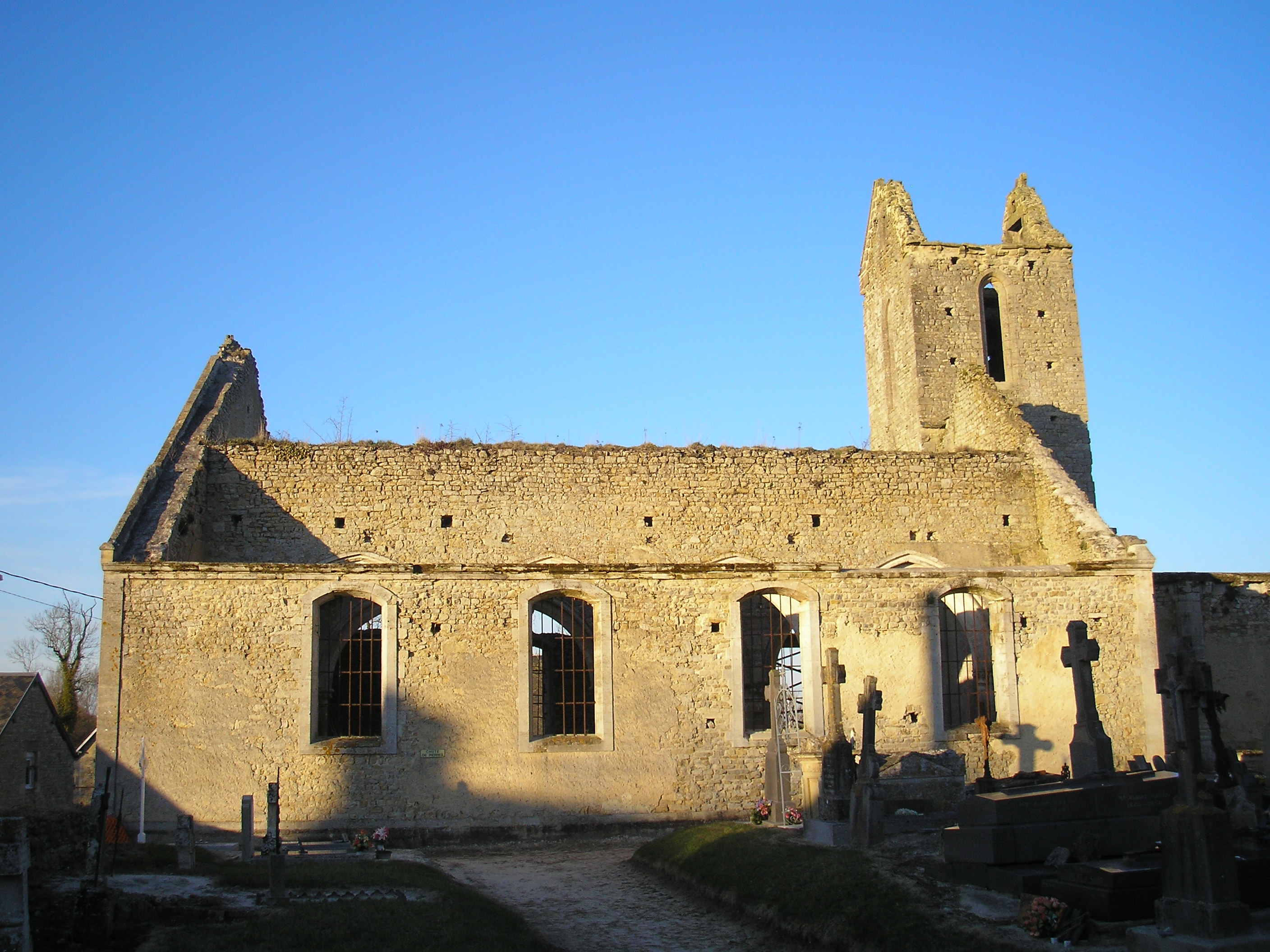 Juaye-Mondaye (Normandie, France). L'ancienne église Saint-Vigor de Juaye.